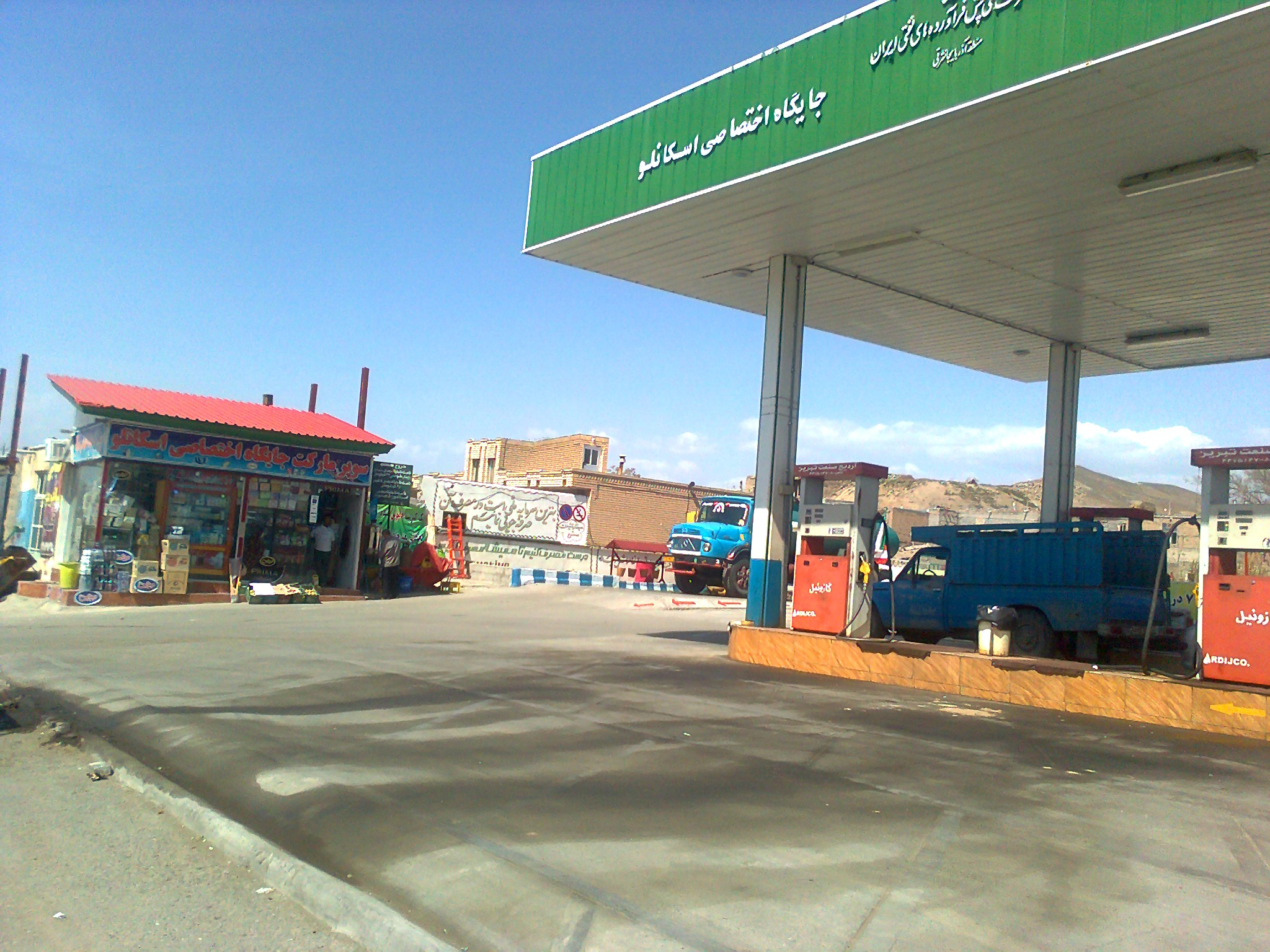 جایگاه بین المللی عرضه سوخت بنزین، گازوییل و نفت سفید